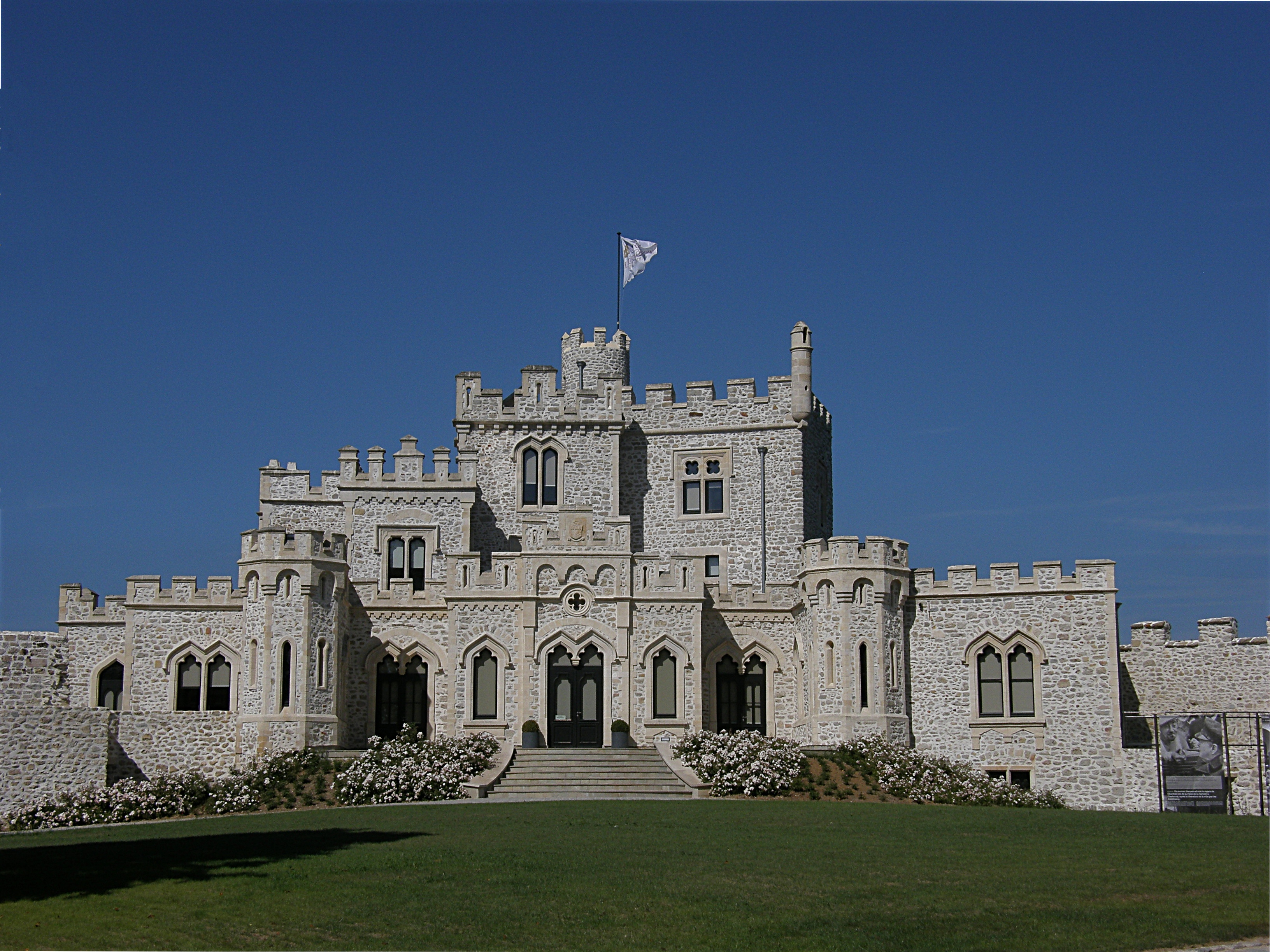 Le château d'Hardelot était un château fort, situé sur la commune de Condette dans le Pas-de-Calais, en France. Le château actuel est un manoir achevé au début du XXe siècle.